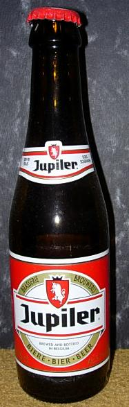 Jupiler bierflesje